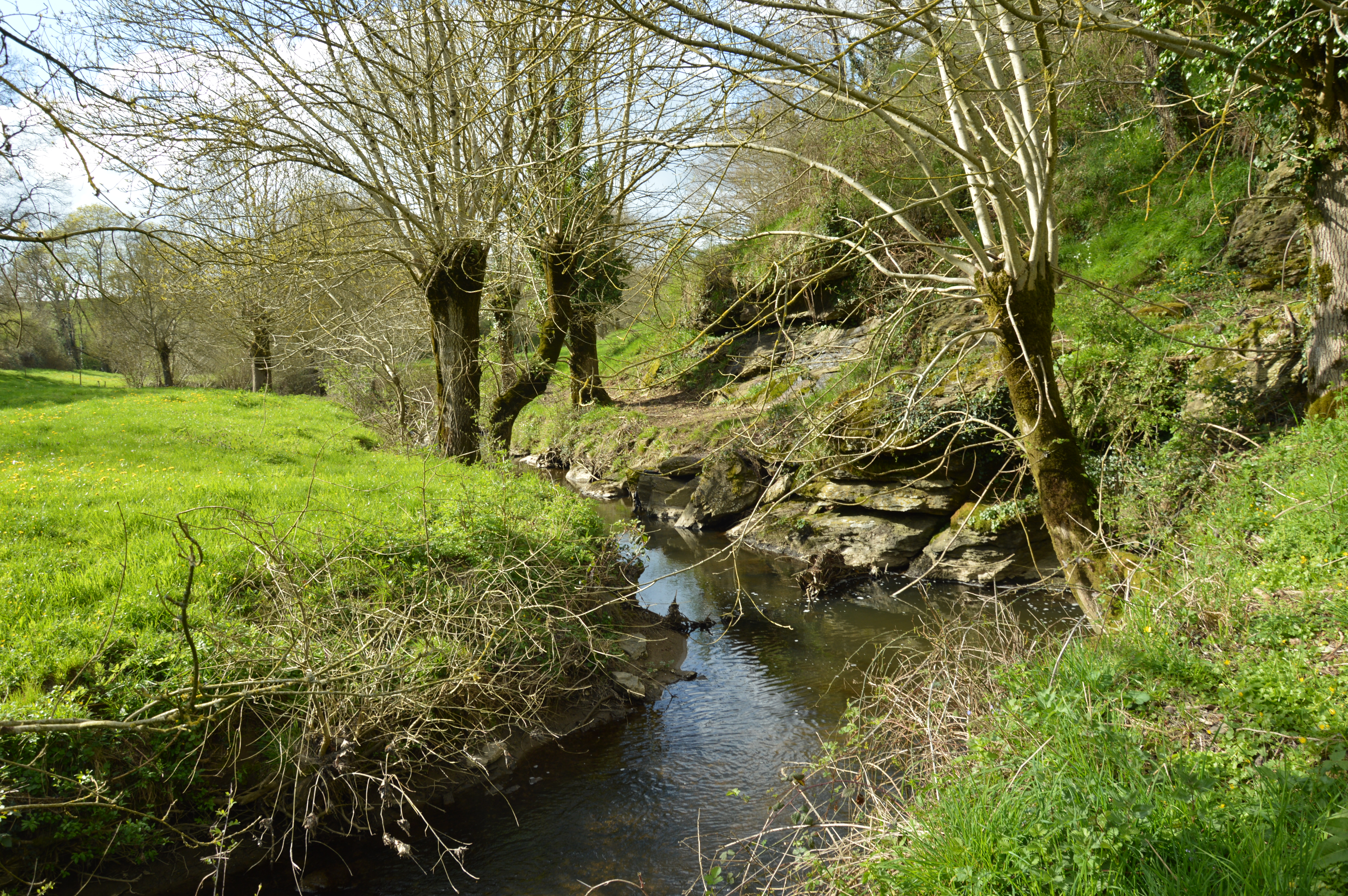 La Vallée de la Divatte à La Boissière du Doré au printemps (France 44)